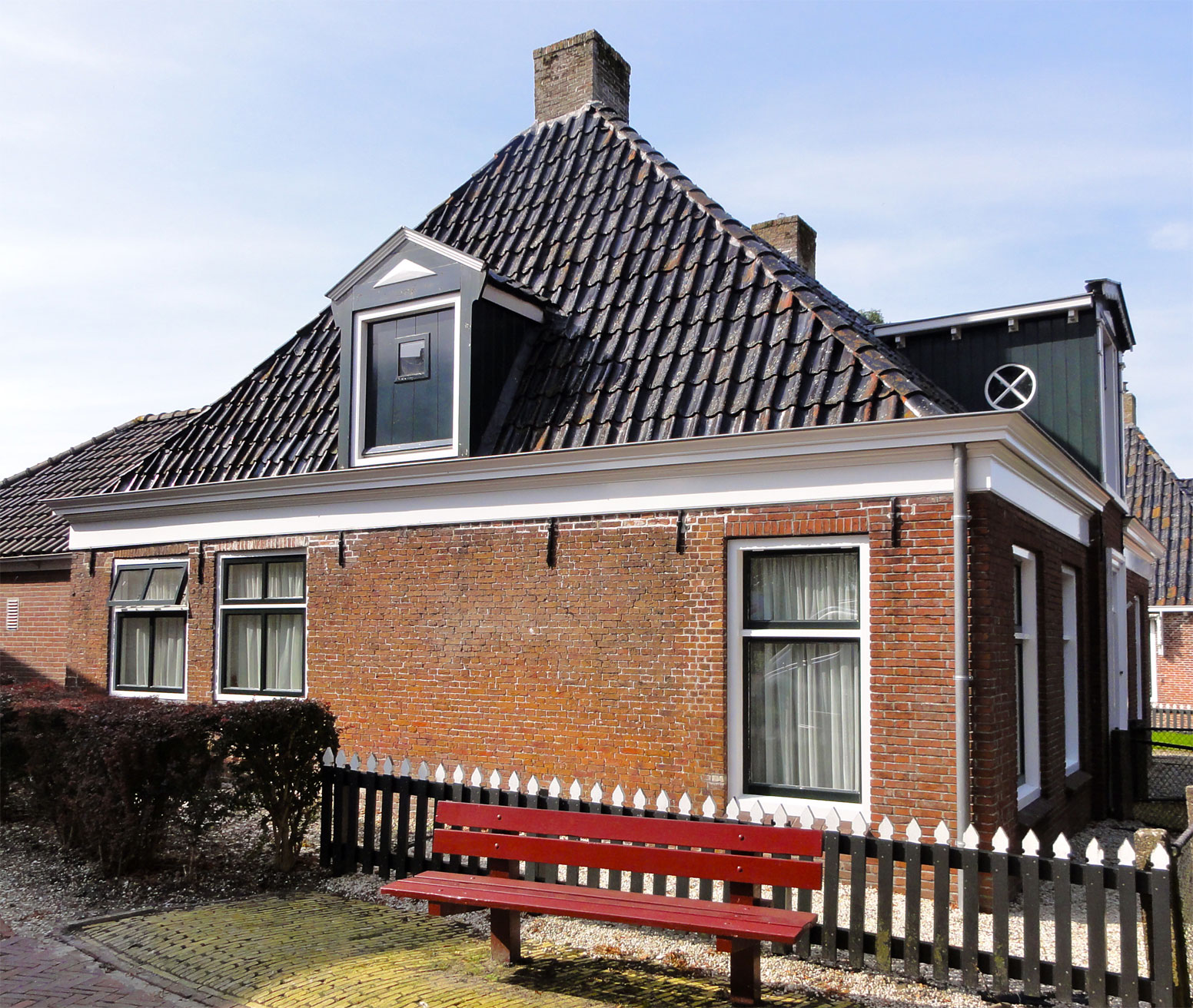 Greate Loane 2 in Ee